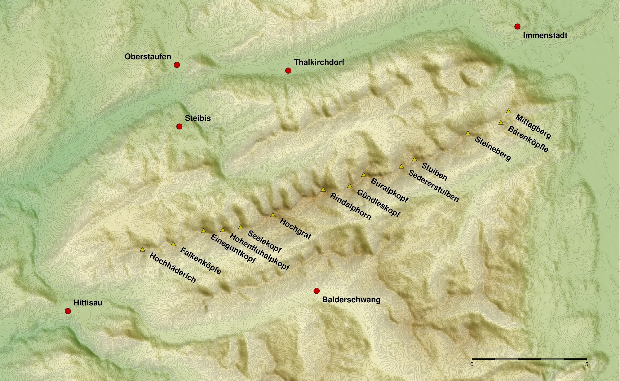 Karte der Nagelfluhkette, SRTM-Daten, Generic Mapping Tools